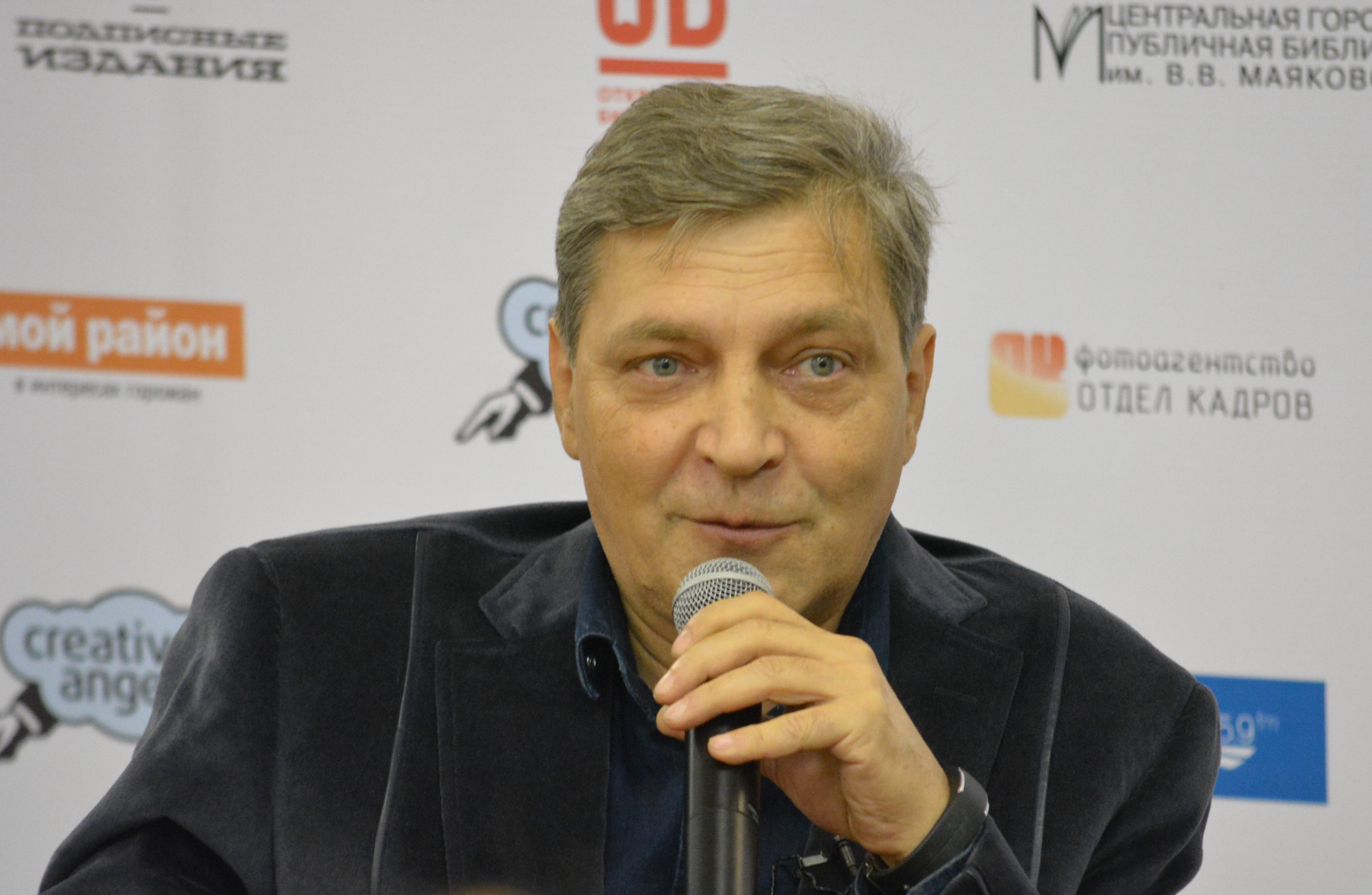 Александр Невзоров на дебатах в рамках «Открытой библиотеки» в Центральной городской публичной библиотеке им. В. В. Маяковского (Санкт-Петербург) 27 сентября 2014 года